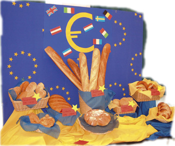 Beschreibung: Backwaren-Präsentation Fotograf: Benutzer:burgkirsch 2001 Quellenangabe und Beleg an burgkirsch(at)web.de erbeten.